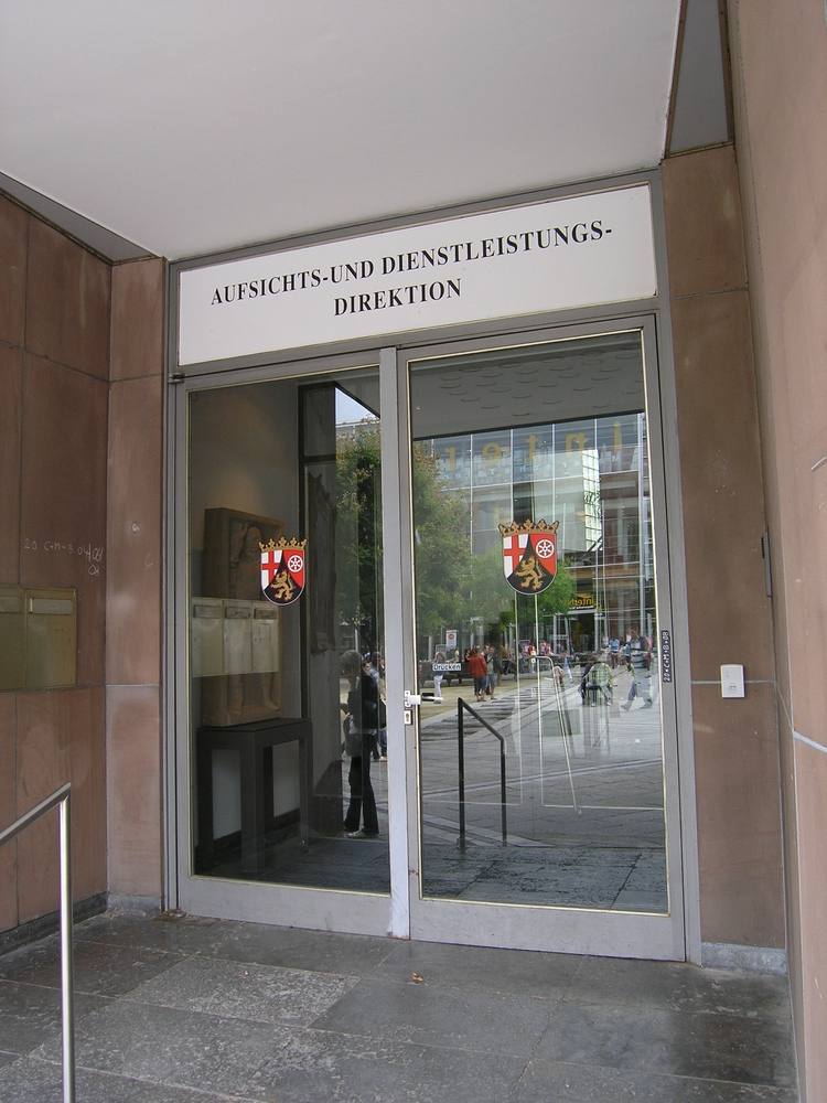 Aufsichts- und Dienstleistungsdirektion Trier